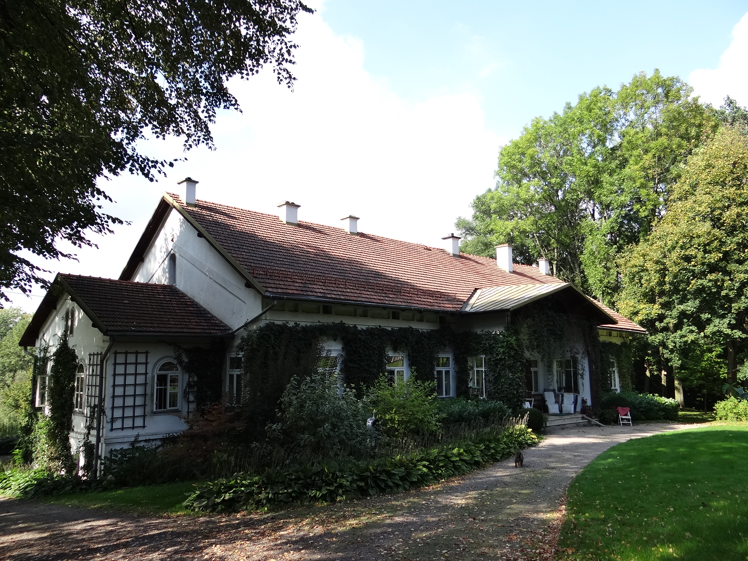 Rybna, zespół dworski, XVIII, XX